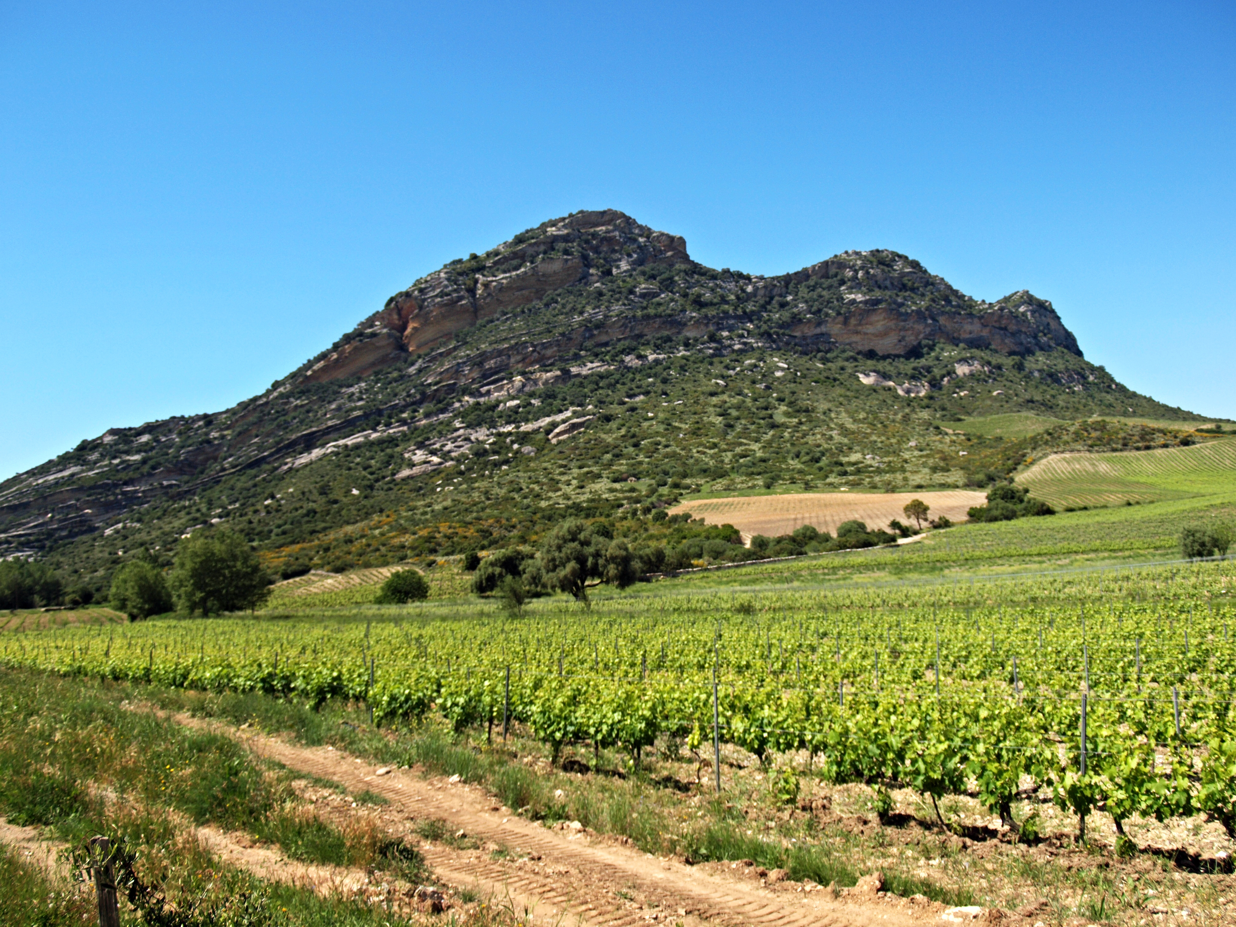 Poggio-d'Oletta, Nebbio (Corse) - Vigne dans la plaine de Poggio, au pied du Monte Sant' Angelo (354 m)